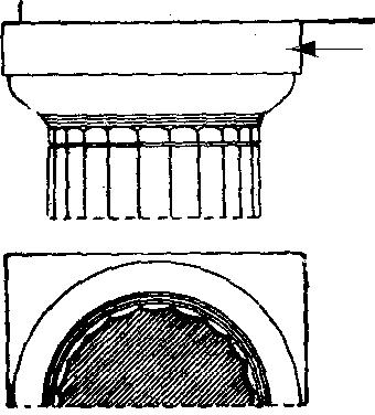 Abacus